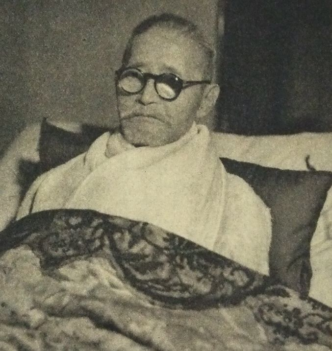 尾崎行雄